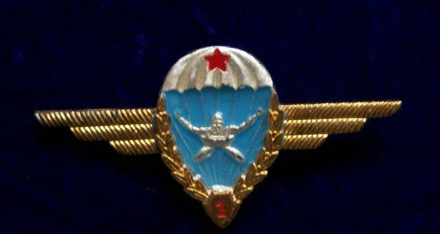 NM I. osztályú ejtőernyős jelvény